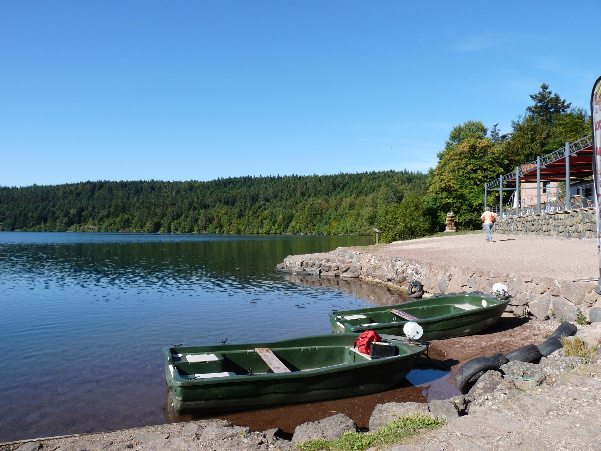 Lac du Bouchet, Frankreich, Département Haute-Loire (43)